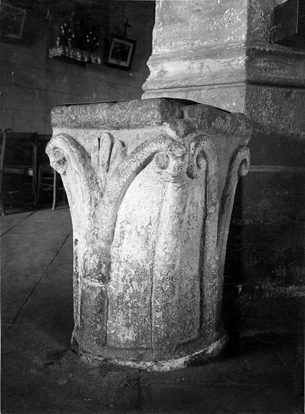 Weihwasserbecken in der Kirche Saint-Saturnin in Rocles (Allier)